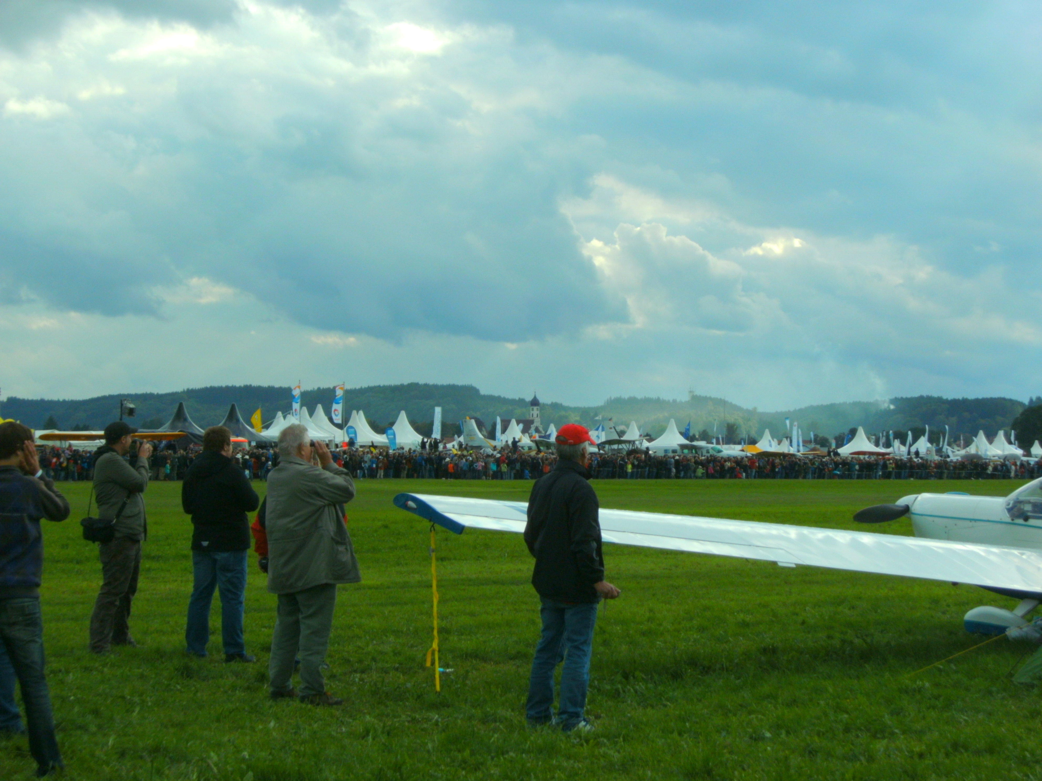 Tannkosh 2010 im Hintergrund die Pfarrkirche St. Martin